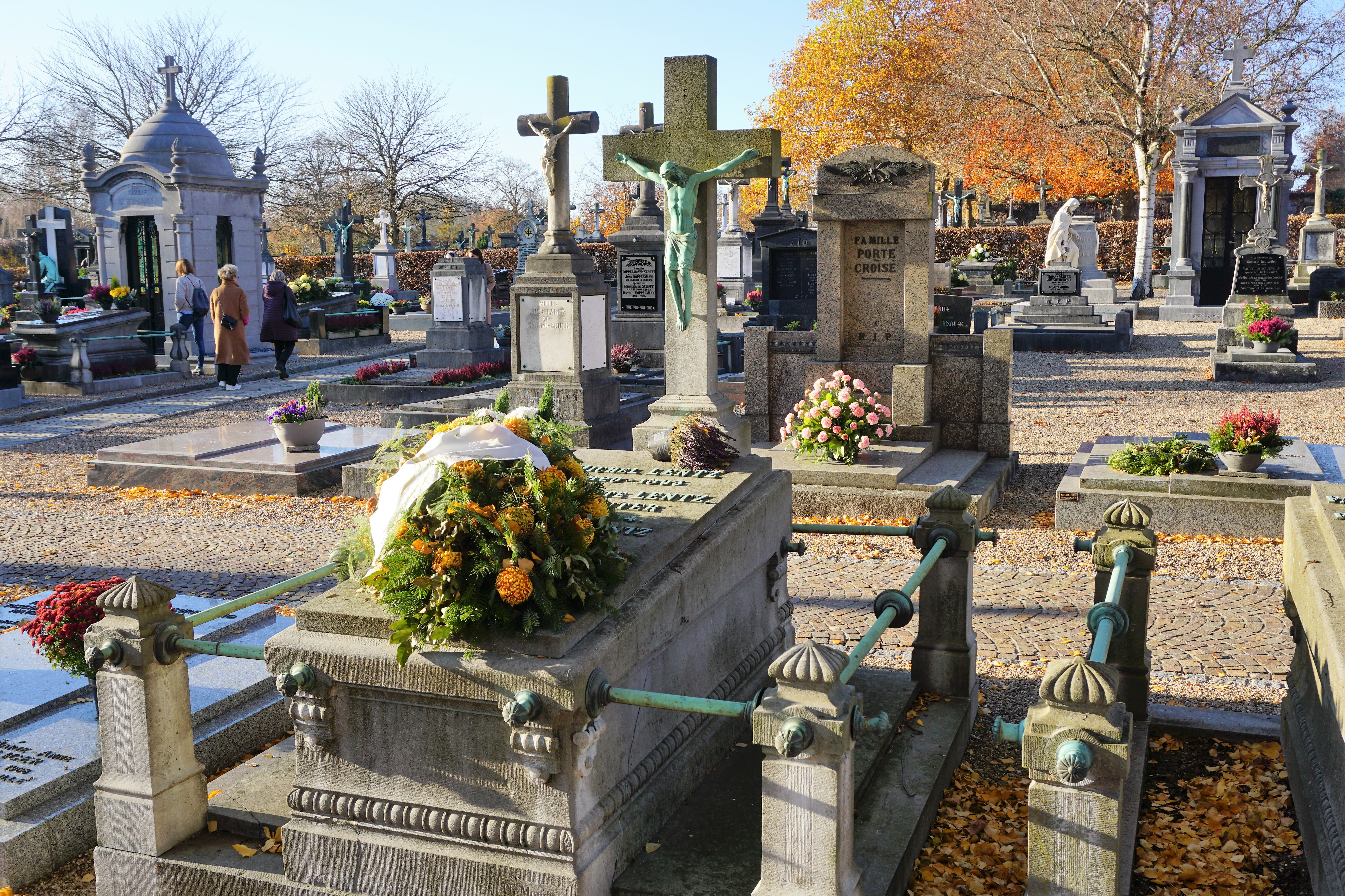 Graf vum Michel Lentz um Nikloskierfecht an der Stad Lëtzebuerg.